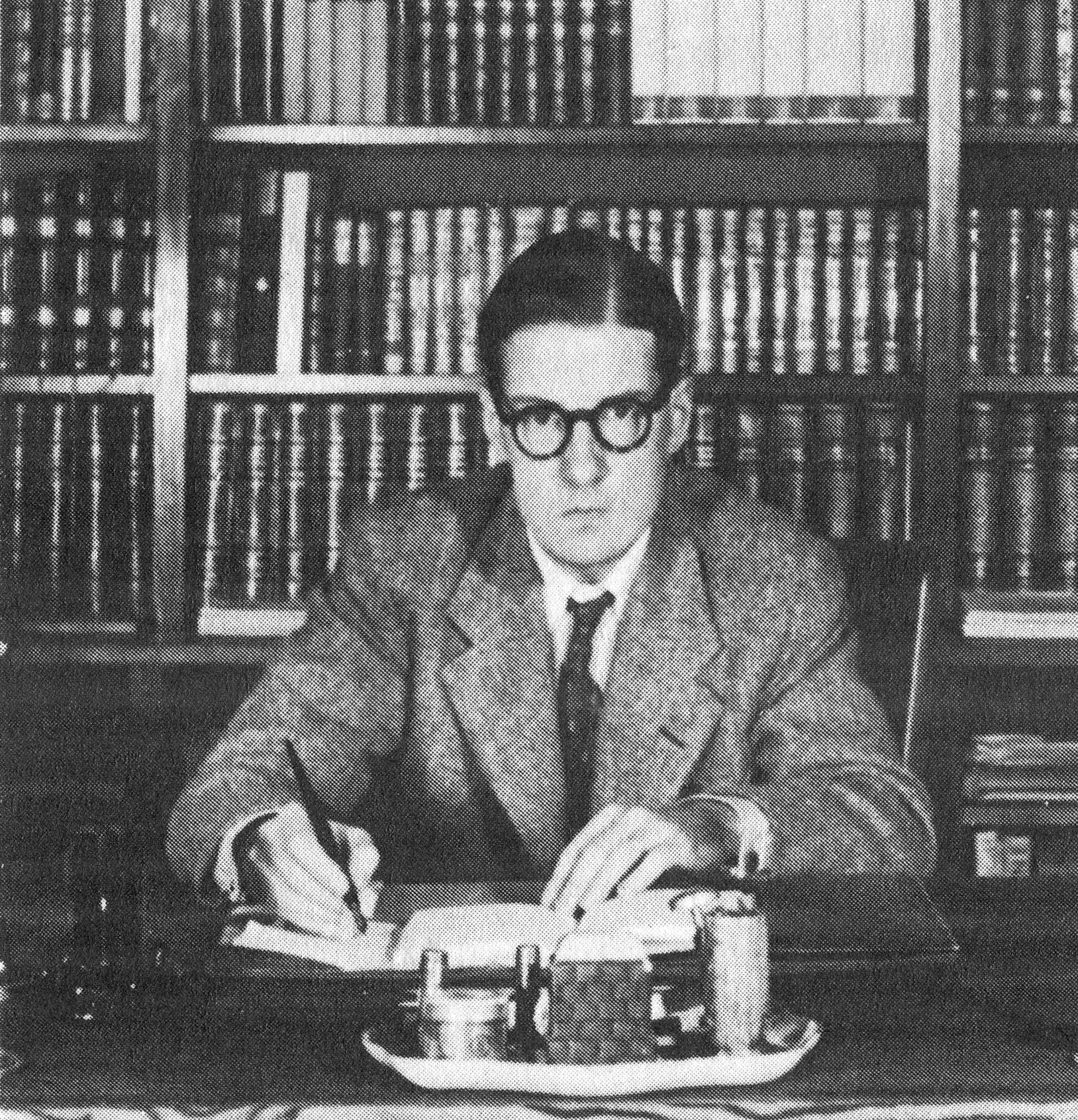 Sven Stolpe.